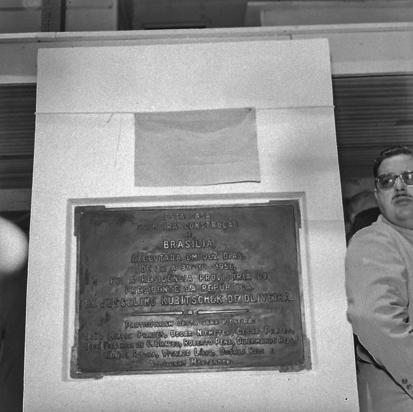 Imagem do Fundo Agência Nacional, do Arquivo Nacional